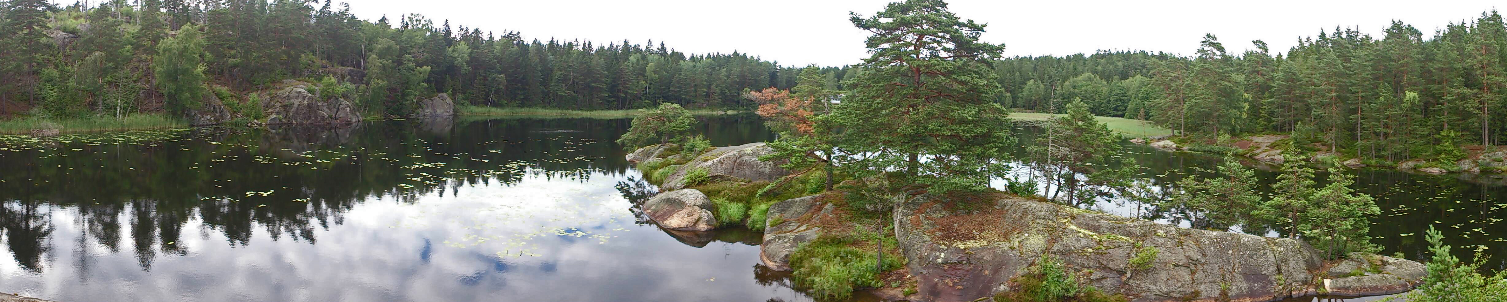 Svartsjön, Tyresta